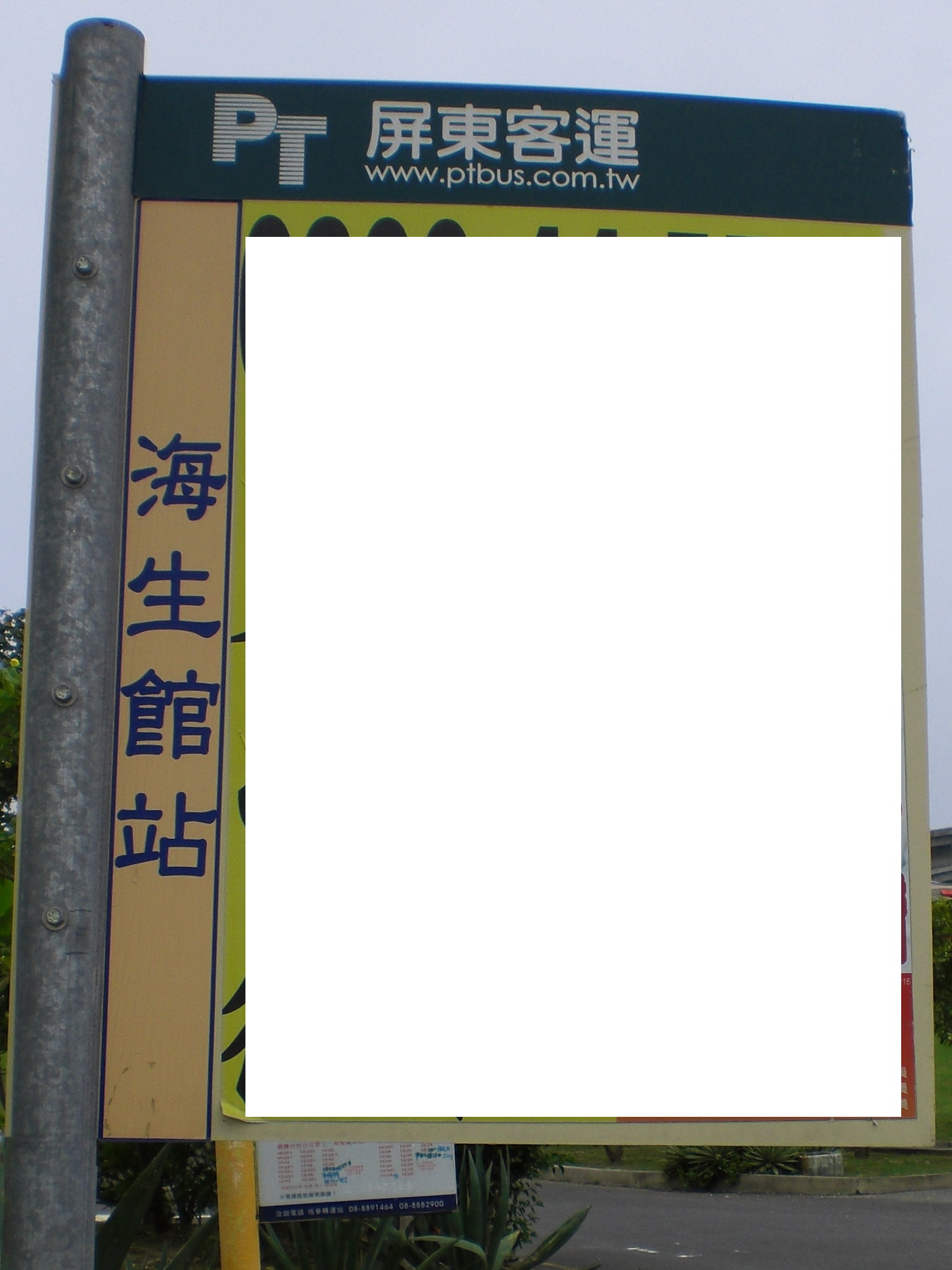 中文（台灣）: 屏東客運「海生館站」站牌，位於國立海洋生物博物館大客車停車場。